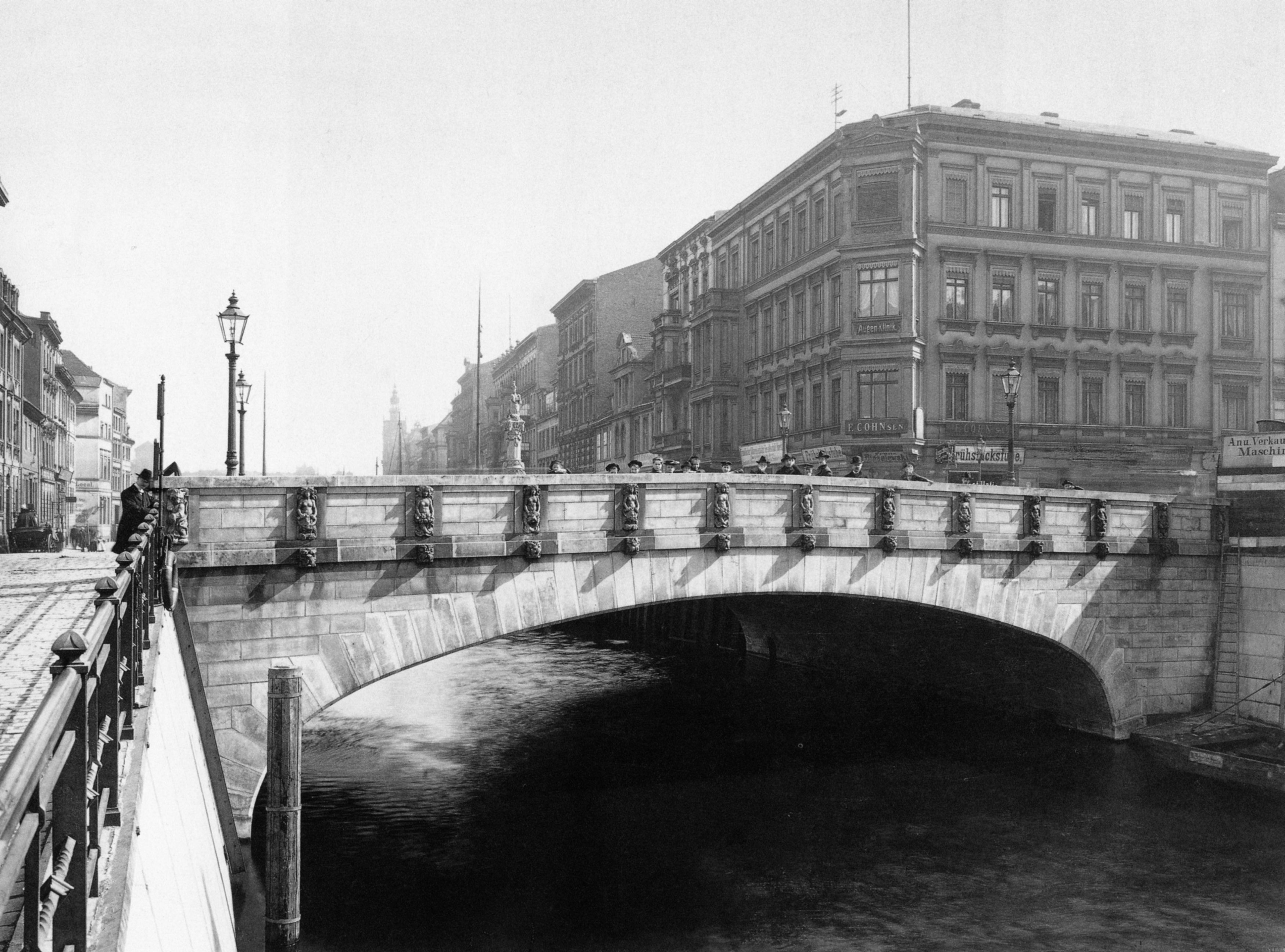 Roßstraßenbrücke über den Spreekanal in Berlin